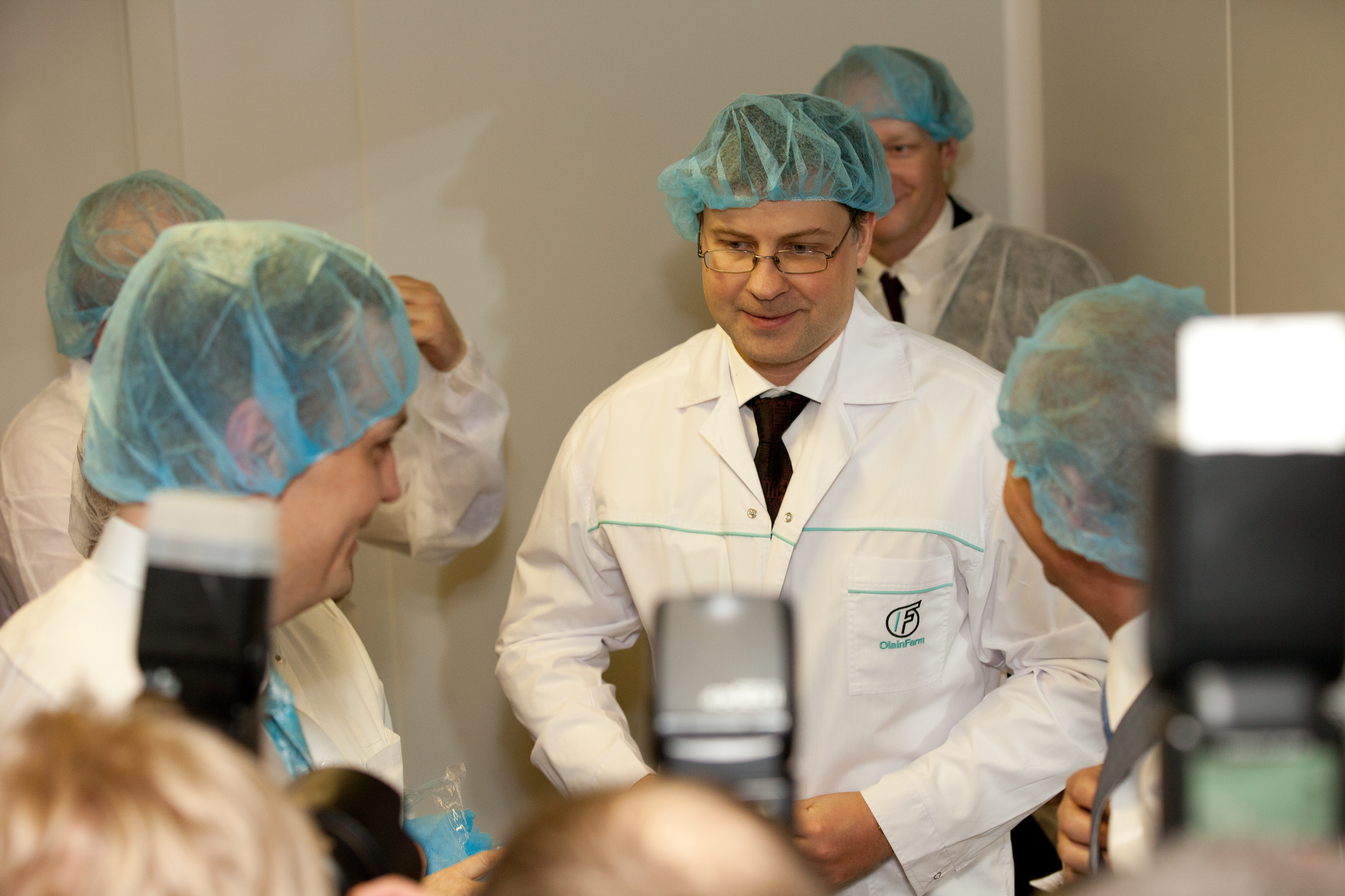 Foto: Toms Norde, Valsts kanceleja